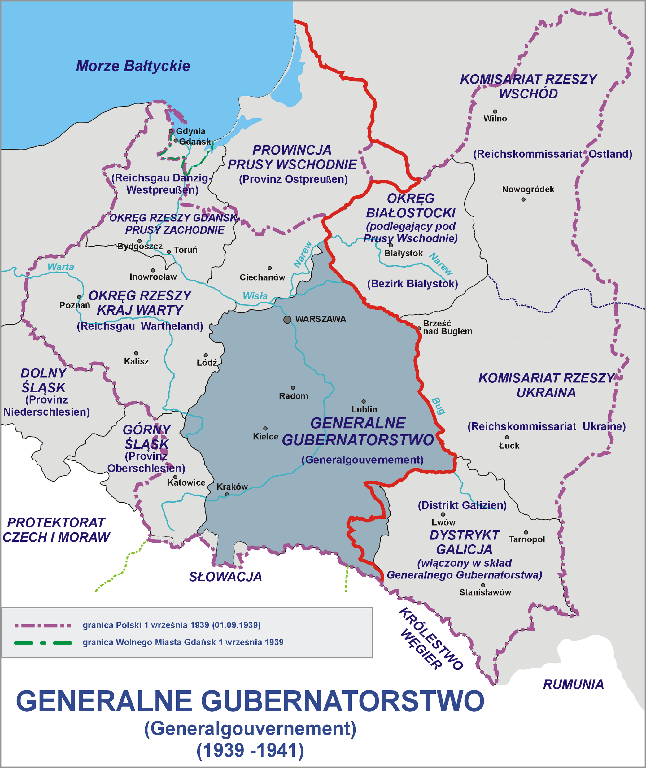 Generalne Gubernatorstwo (Generalgouvernement) 1939-1942